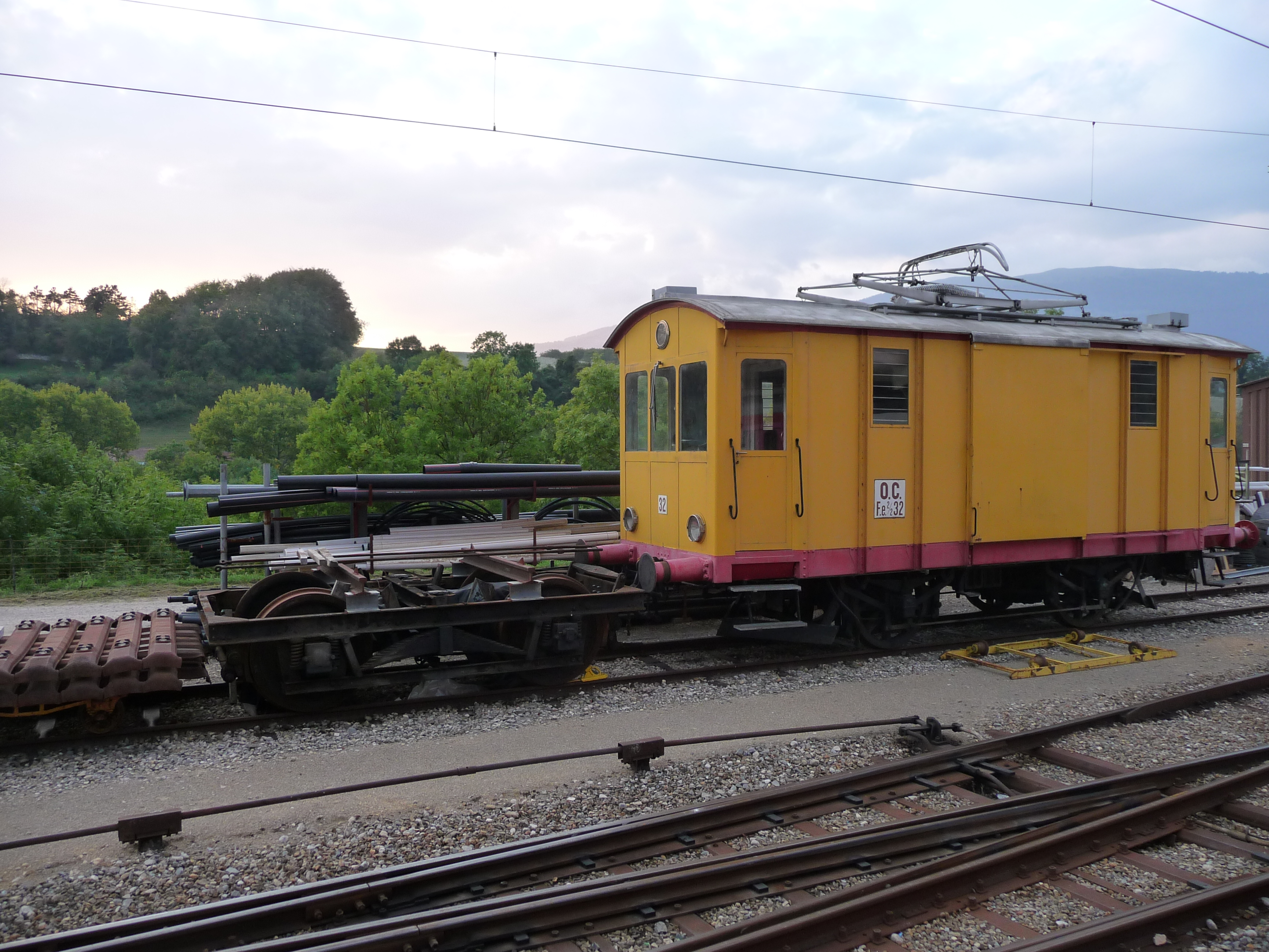 Fe 2/2 32 der Orbe–Chavornay-Bahn in Orbe.